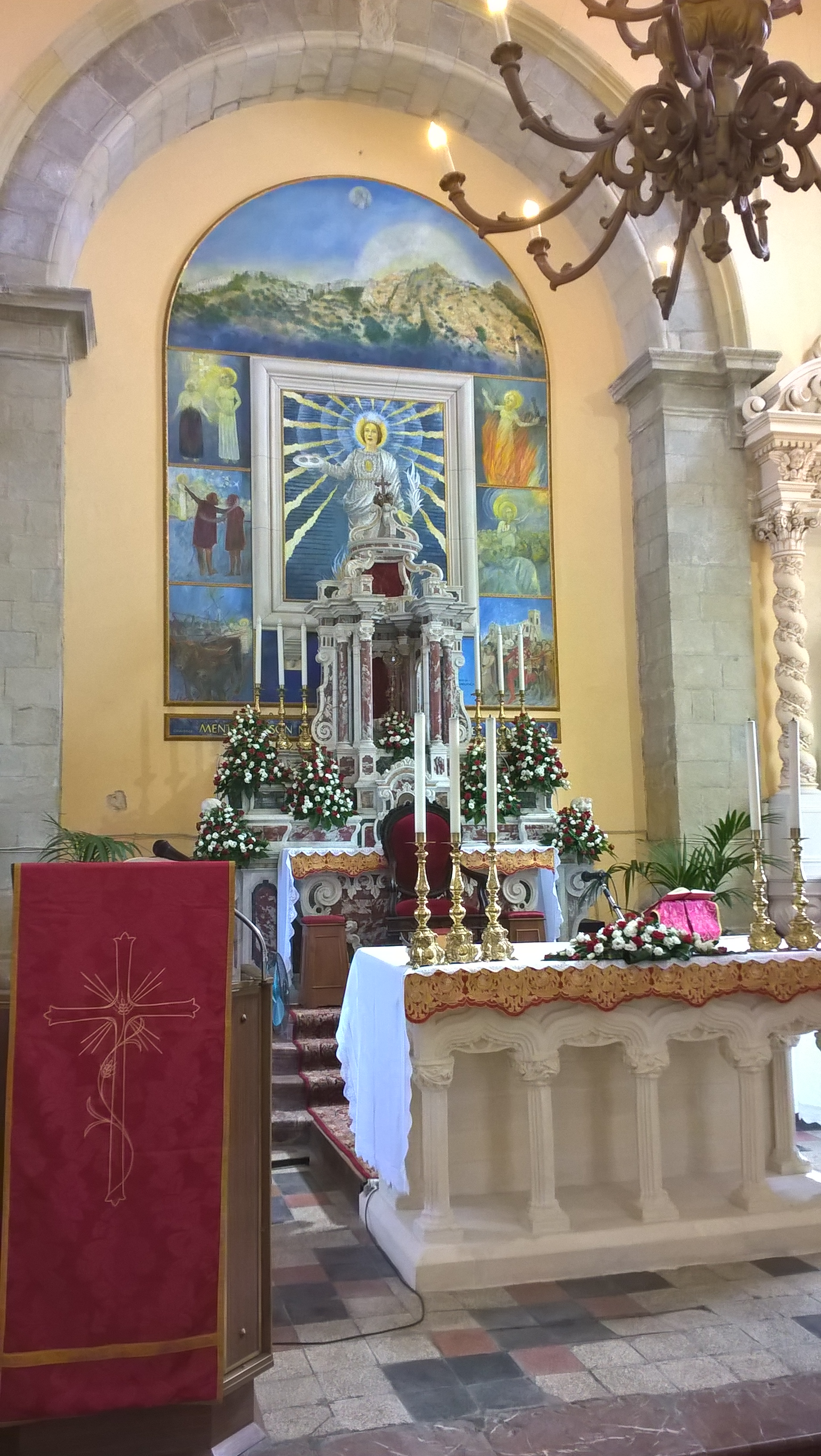 Savoca, l'altare maggiore della chiesa di San Nicolò.